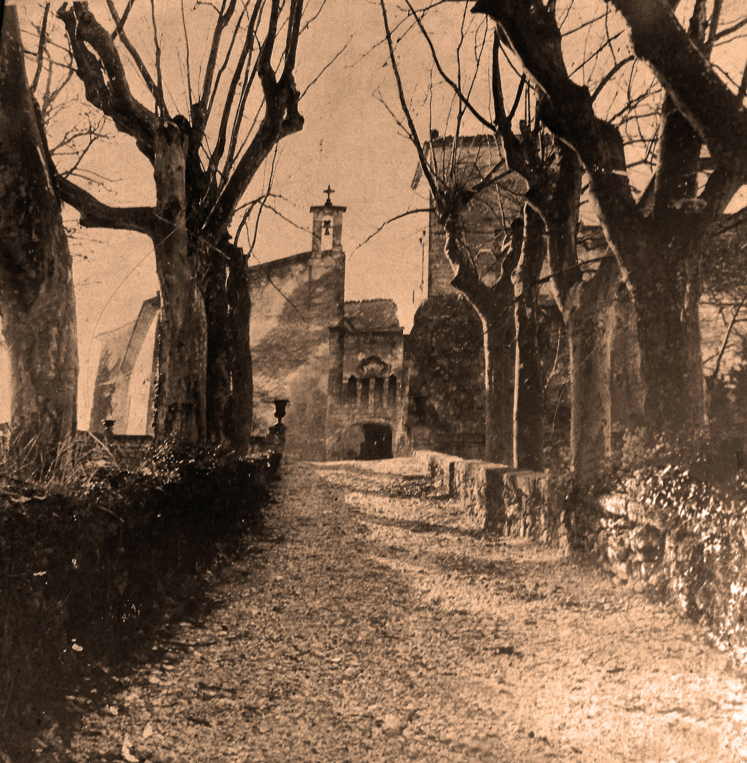 Chateau du Domaine La Canorgue, à Bonnieux, Vaucluse, France